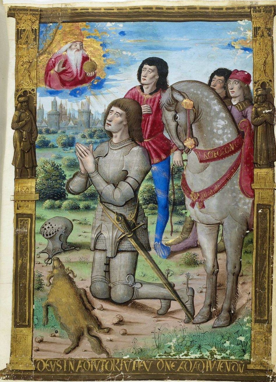 Gédéon en prière. On voit la toison à ses prieds